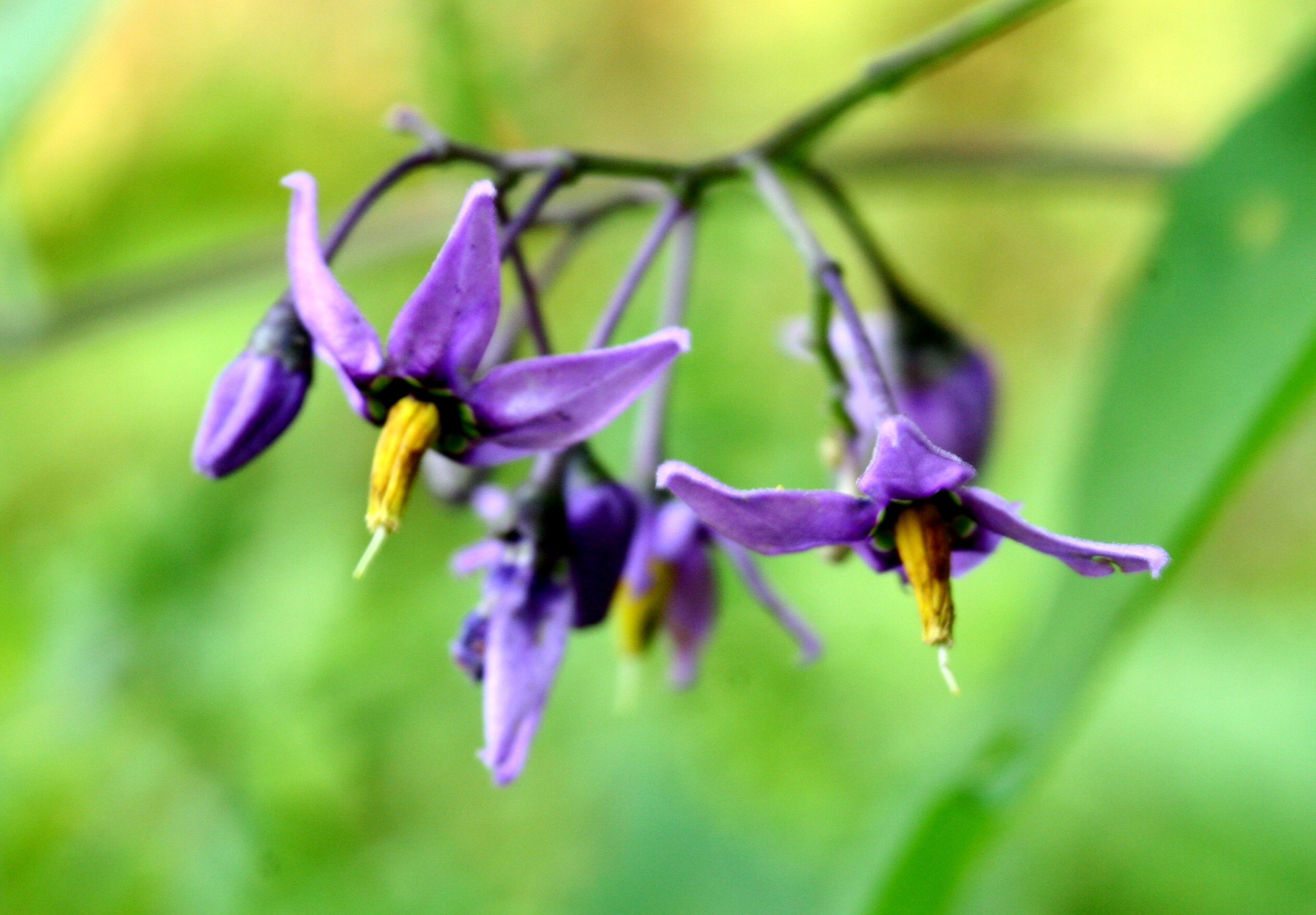 Solanum_dulcamara (Morella rampicante) Località : Valmorel, Limana (BL), 800 m s.l.m.